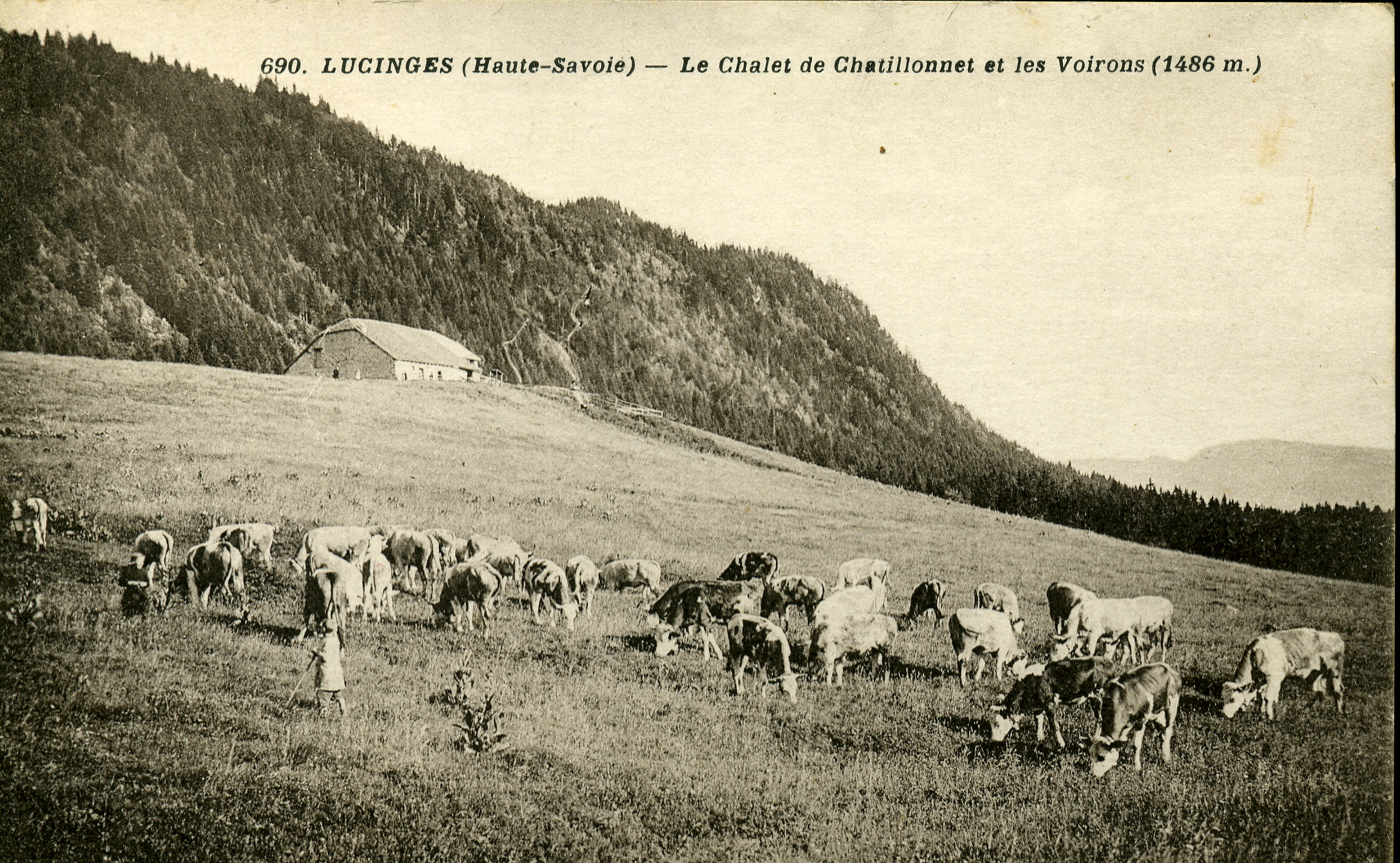 Carte présebtant le petit château de chatillonet et ses alpages. Aujourd'hui, tous les alpages que l'on voit sont occupés par de la forêt